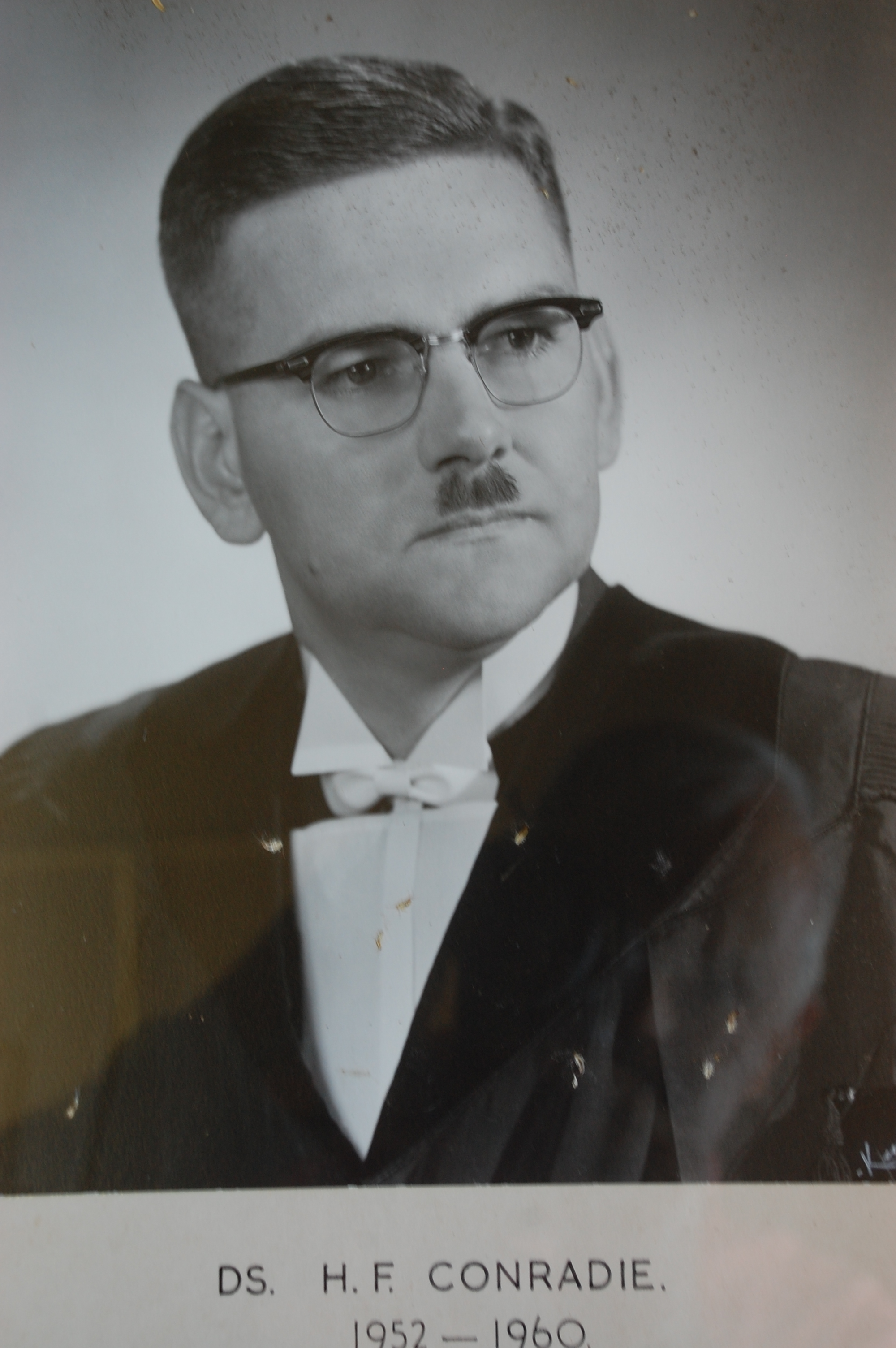 Vertrek na Kimberly-Noord